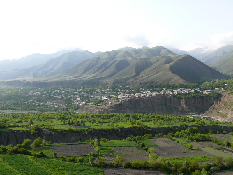 Селение хрюг с высоты